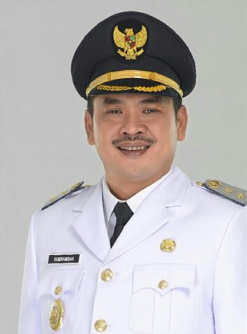 Sumrambah Wakil Bupati Jombang ke 19